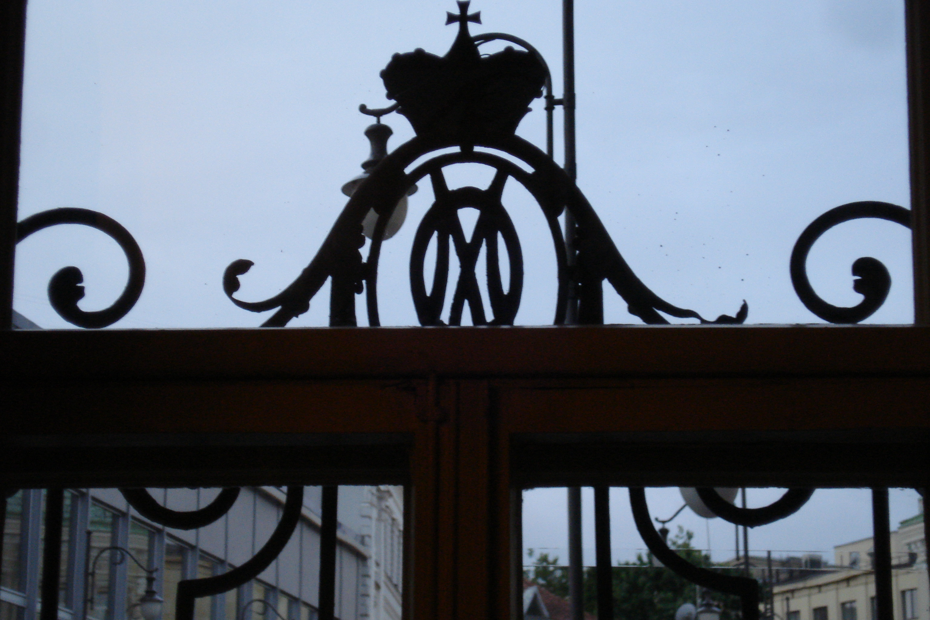 Решётка с вензелем княгини Марии Огинской. Дворец Союза писателей Литвы. Вильнюс